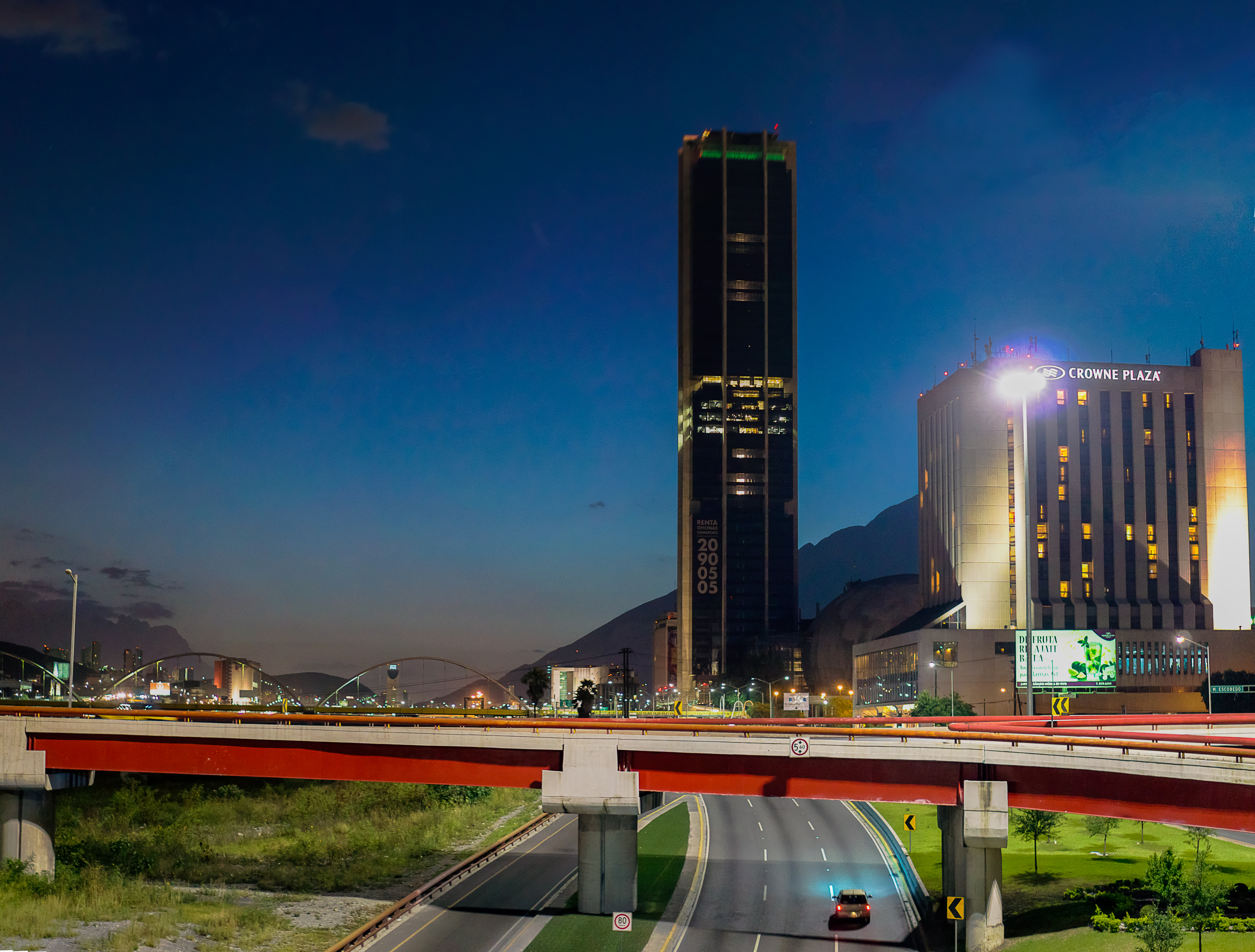 Avenida Constitución, una de las principales avenidas de la ciudad.